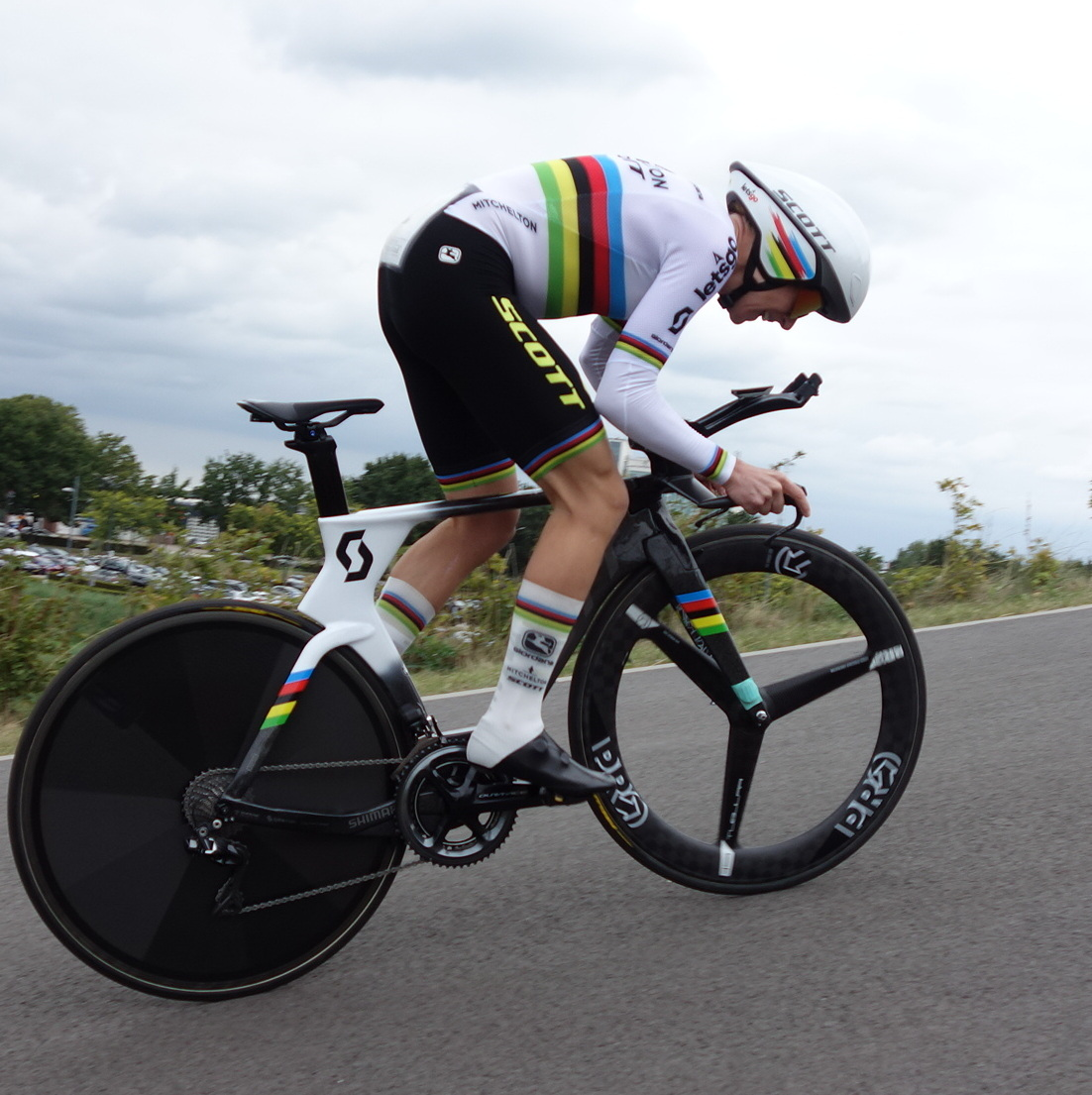 Wereldkampioene Annemiek van Vleuten (Mitchelton-Scott) won de proloog op het Tom Dumoulin Bike Park in Sittard in de Boels Ladies Tour 2019